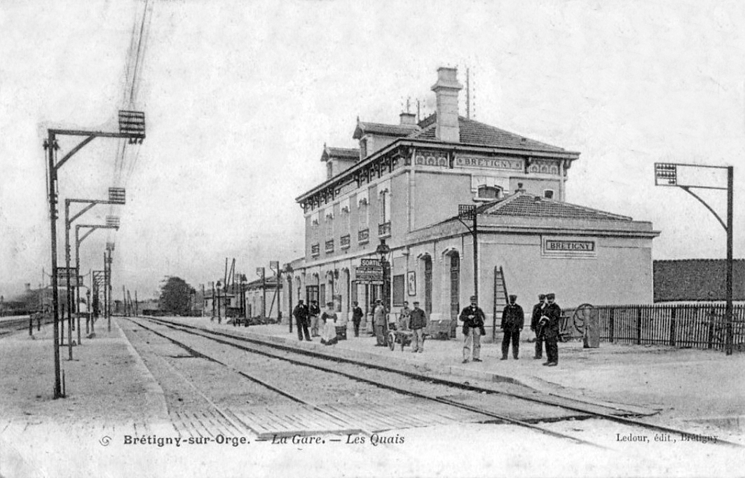 L'intérieur de la gare de Brétigny avec un quai central et le bâtiment remodelé (décorations de façade, chiens assis, cheminées...) et agrandi (deux ailes à deux ouvertures).